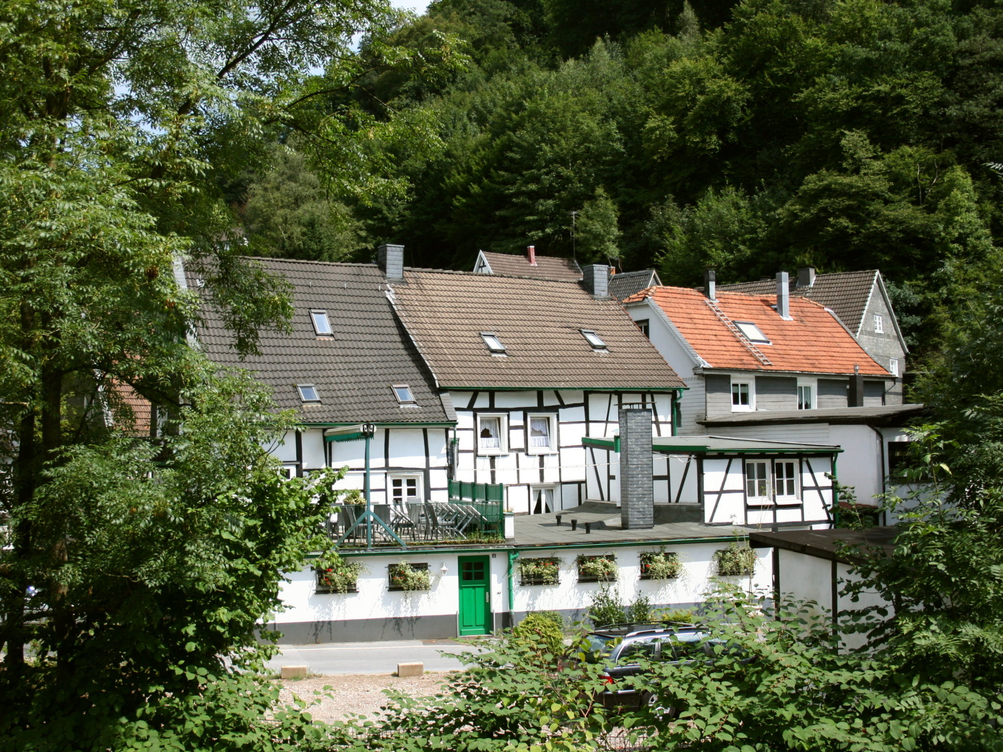 Solingen-Burg (Unterburg)